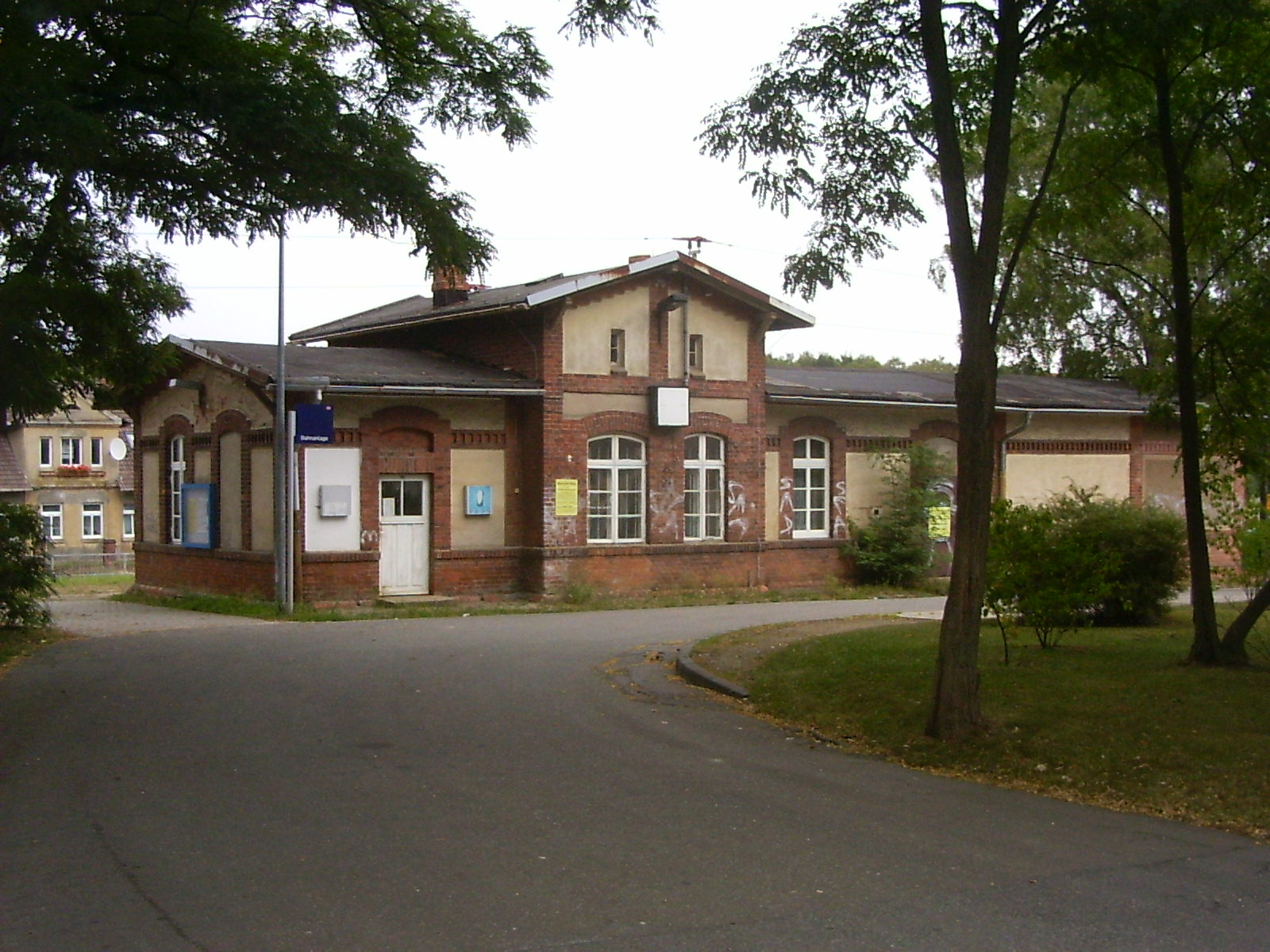 Ventschow, station, straatzijde